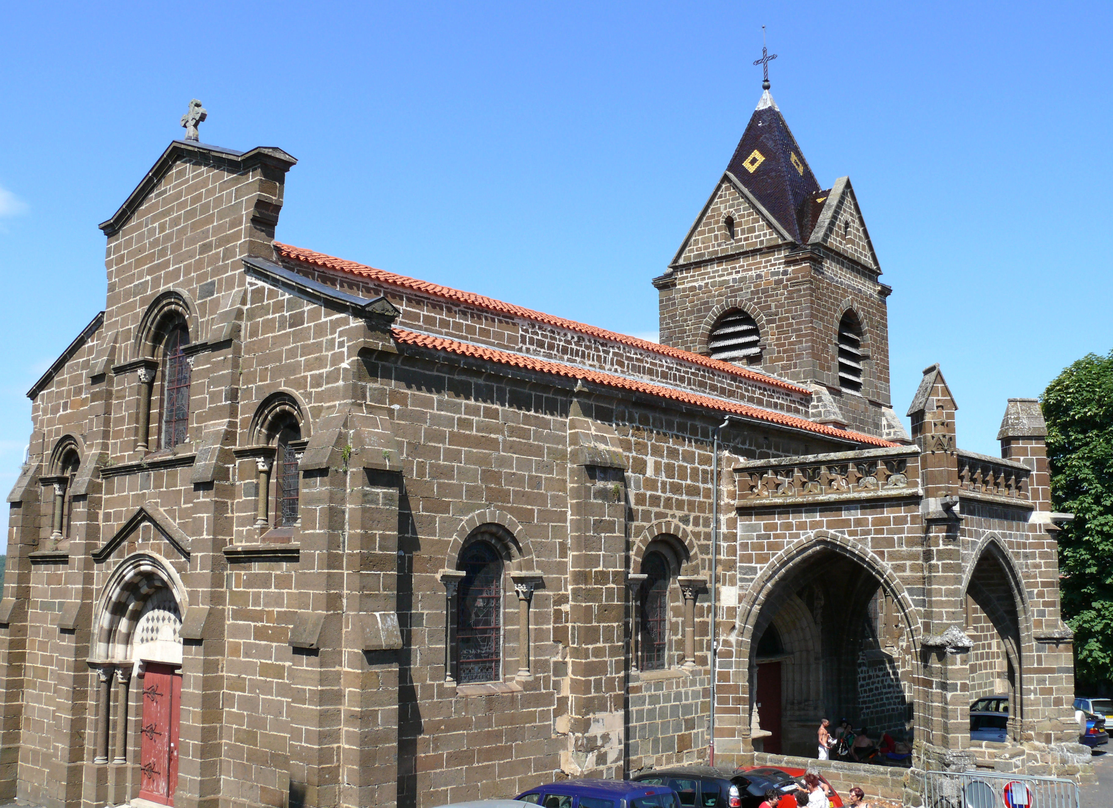 Église Saint-Martin de Polignac - Ensemble